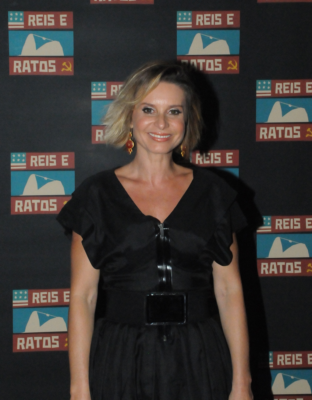 A atriz Paula Burlamaqui.